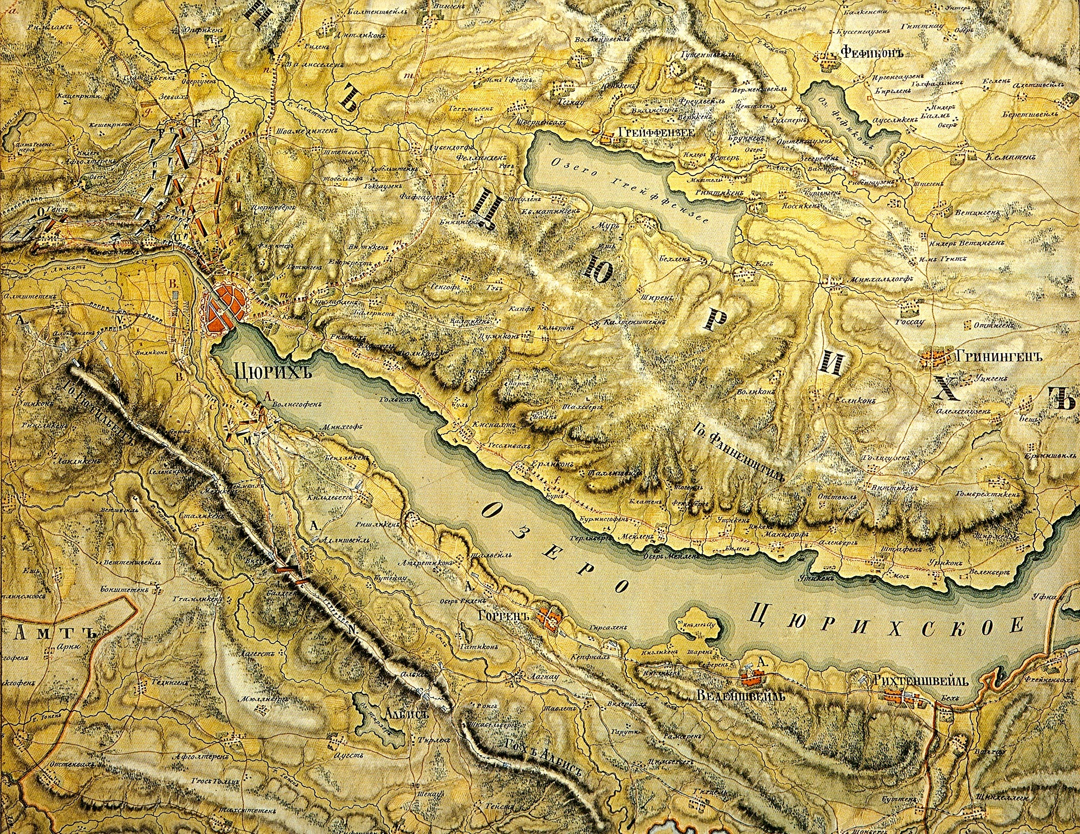 Zürichsee auf der Karte von Alexander Wassiljewitsch Suworow, 1799